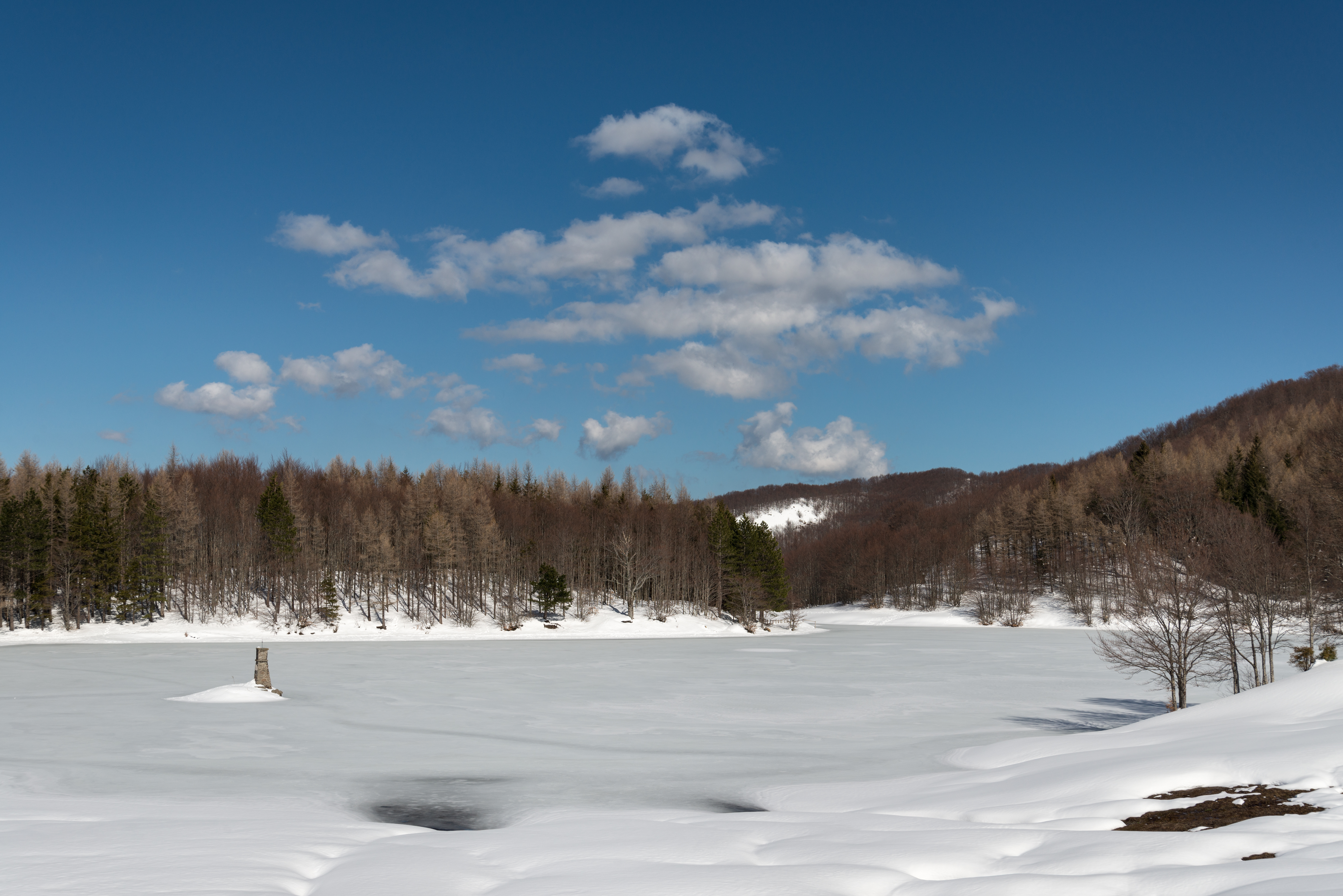 Lago Calamone - Ventasso, Ramiseto, Reggio Emilia, Italia